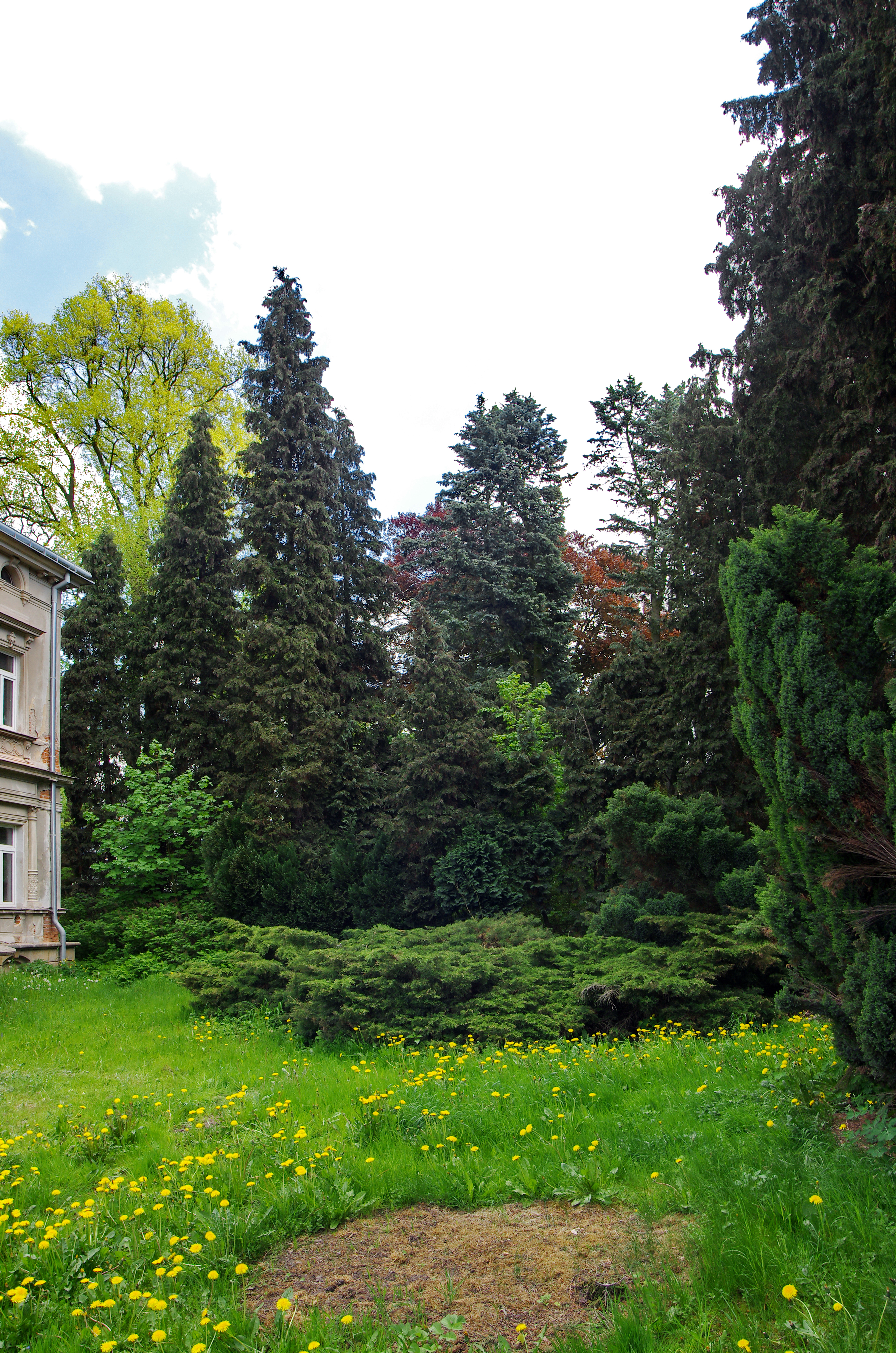 Skupina památných stromů - Maškova zahrada - Turnov